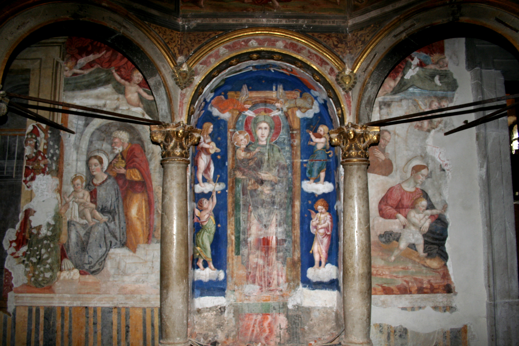 L'affresco della Vergine, circondata dagli angeli, ritenuto miracoloso, nel tempietto del Santuario Madonna del Castello di Almenno San Salvatore, anteriore al XII secolo.